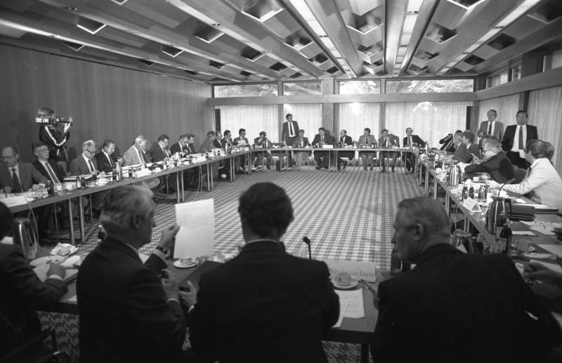 Konferenz der Ministerpräsidenten der Länder im Gästehaus der Landesvertretung Hessen in Bonn. Thema: Sateliten-Fernsehen.